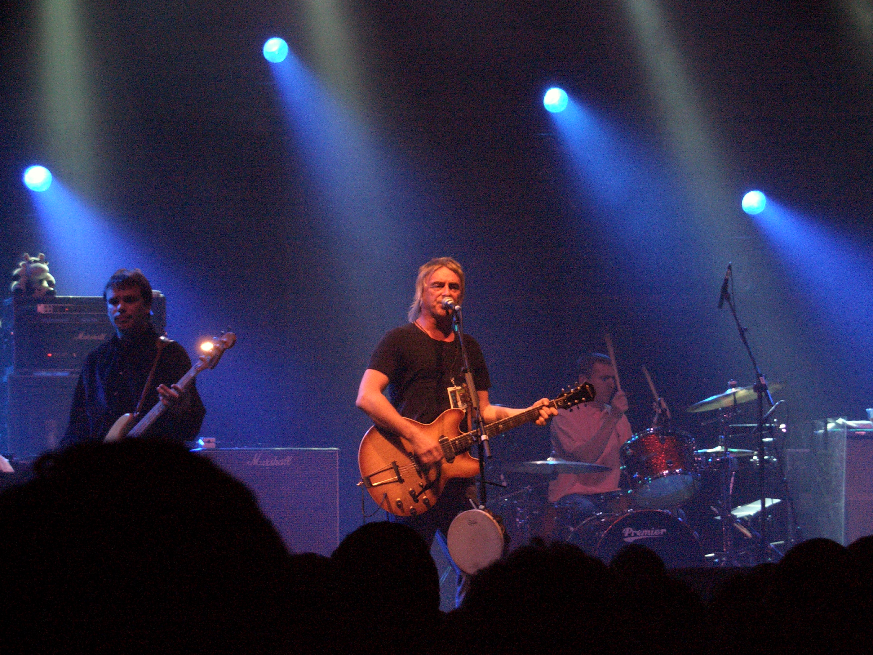 Paul Weller bei seinem Auftritt am 24.10.2005 in der Muffathalle, München